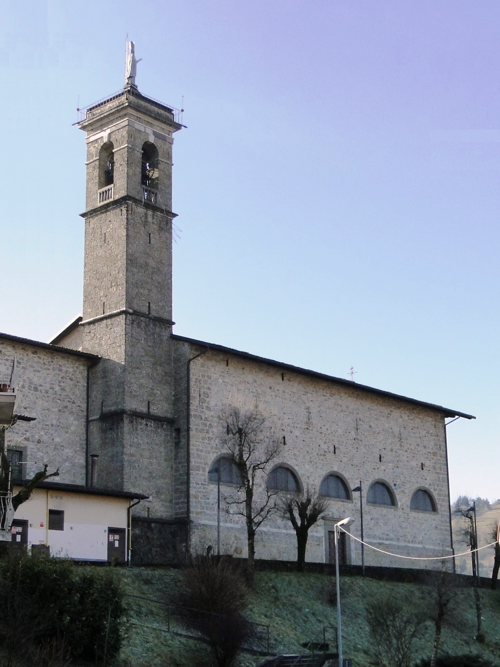 Chiesa san Martino. Leffe (BG). Italy